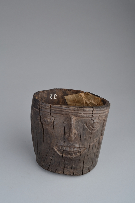 Quero o bicchiere in legno duro, rappresentante il viso di un personaggio dal naso a freccia, con gli occhi e i denti leggermente sporgenti che sembrano uscire da una maschera. Sul retro incisioni. Nella tradizione culturale huari-tihuanaco sono comuni i bicchieri in legno che normalmente hanno un profilo più slanciato, spesso con elementi in rilievo (come volti di divinità o animali). Questo oggetto sembra una produzione locale che imita lo stile huari più classico.